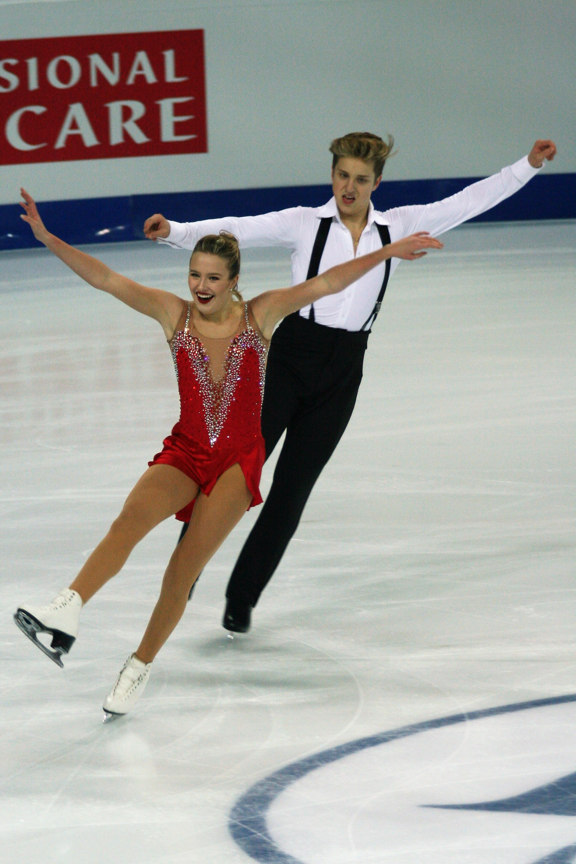 Кристина Каррейра / Энтони Пономаренко (США) на финале Гран-при по фигурному катанию среди юниоров 2016-2017